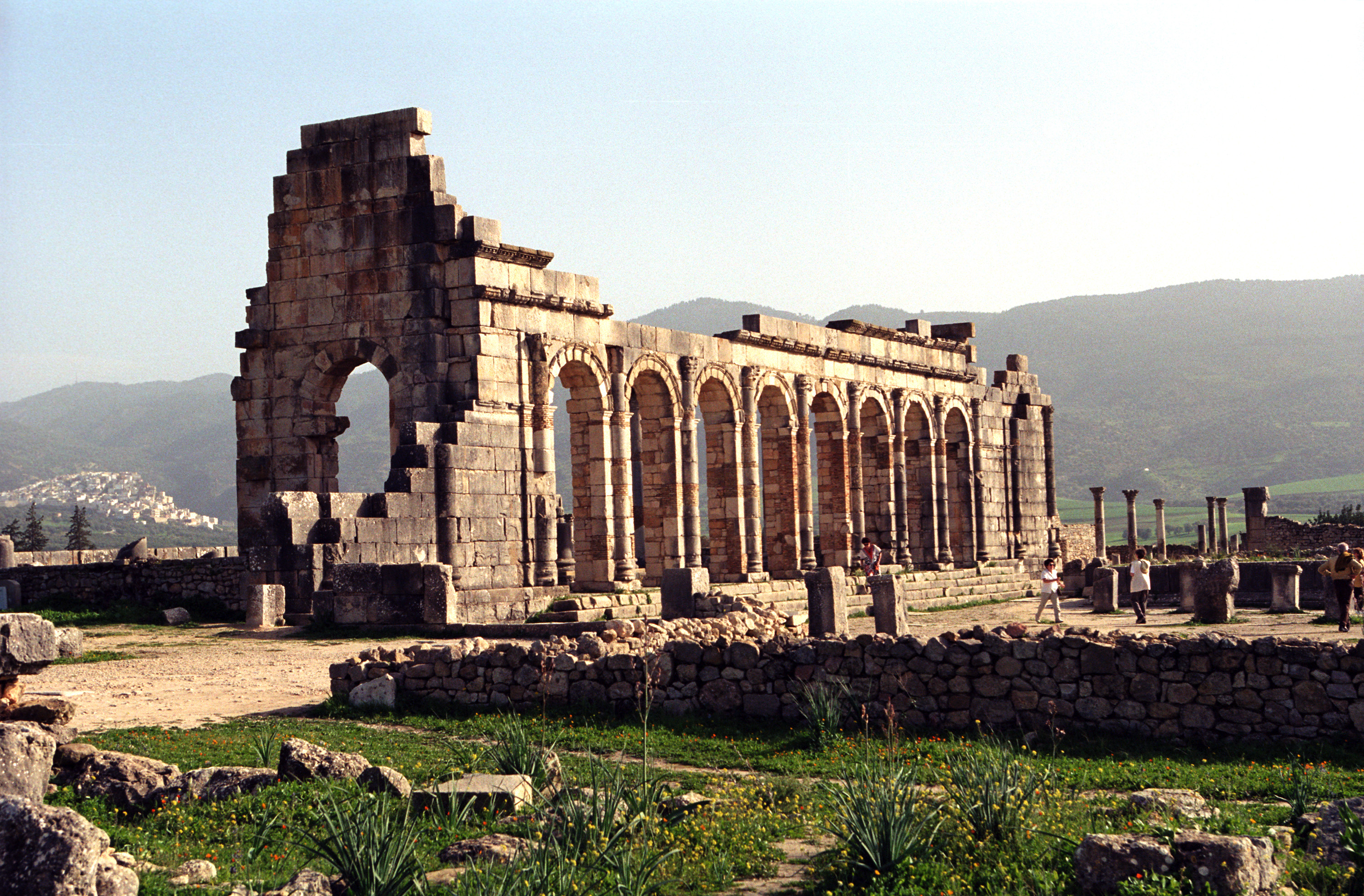 Volubilis, Morocco